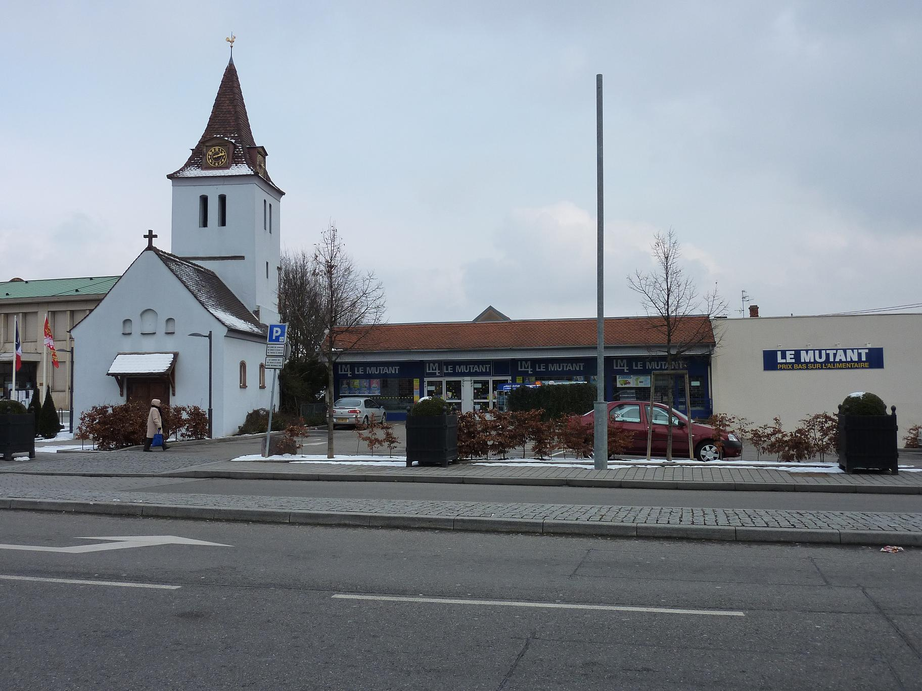 Le si beau centre de Hoenheim: à gauche de cette charmante chapelle la mairie, splendide horreur des 60s, et à sa droite un si beau supermarché... à signaler quand même qu'à sa rénovation on lui a rajouté ce si beau toit de tuiles....